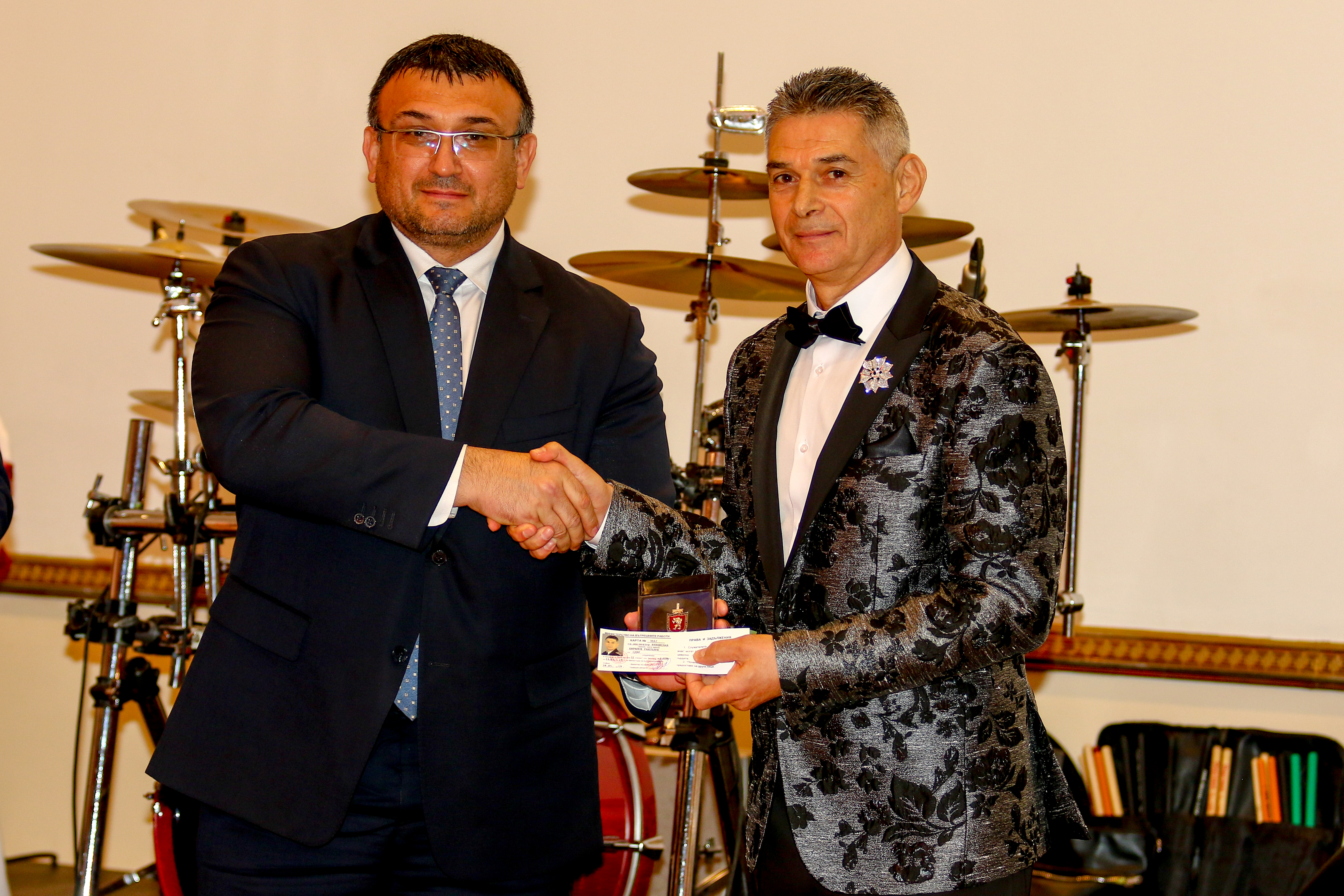 Министърът на вътрешните работи на България Младен Маринов награждава Венцислав Рангелов по случай юбилея му, 30 май 2019 г.